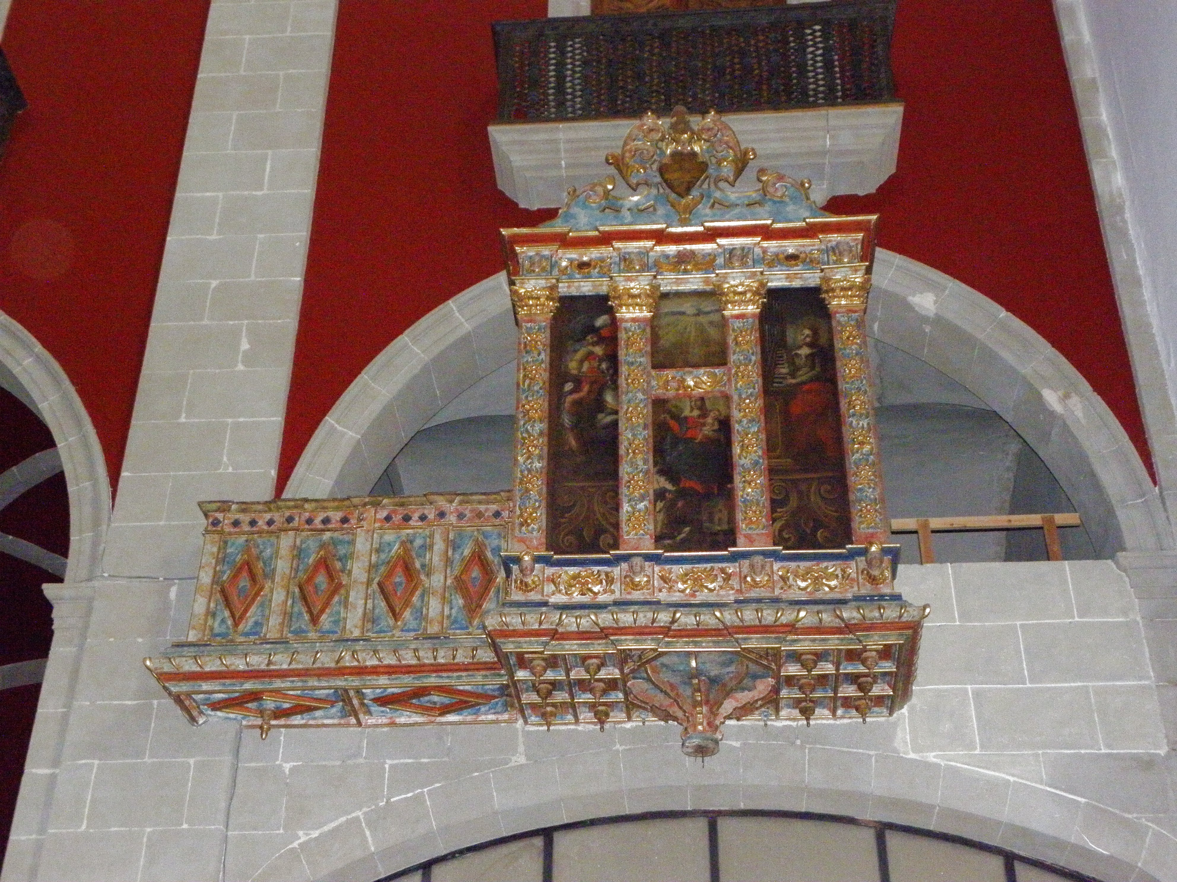 Orgue restaurat del Santuari del Miracle (Riner, Solsonès)